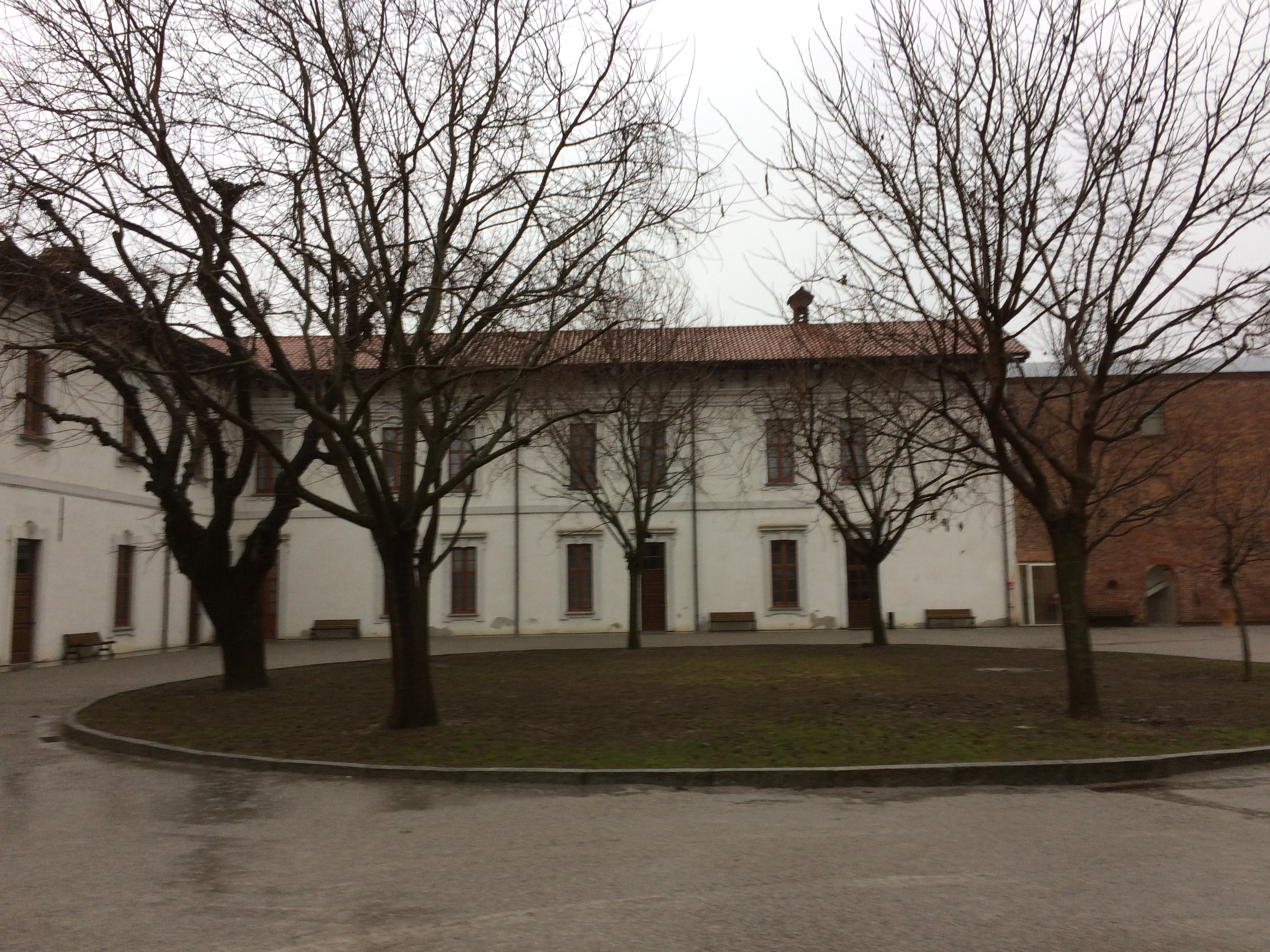 Castello di San Giorgio, Legnano